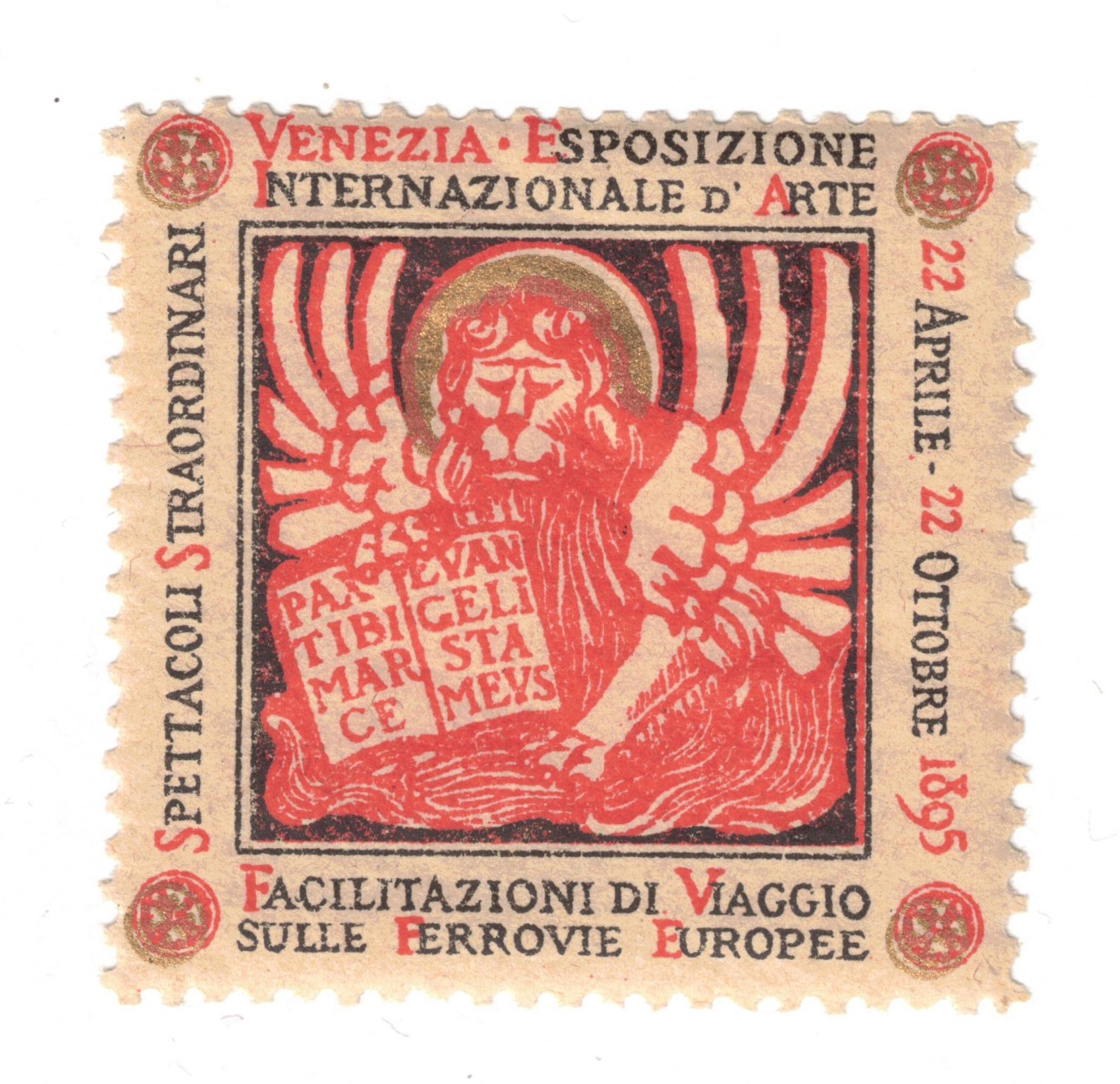 Viñeta de la primera edición de la Bienal de Venecia de 1895.